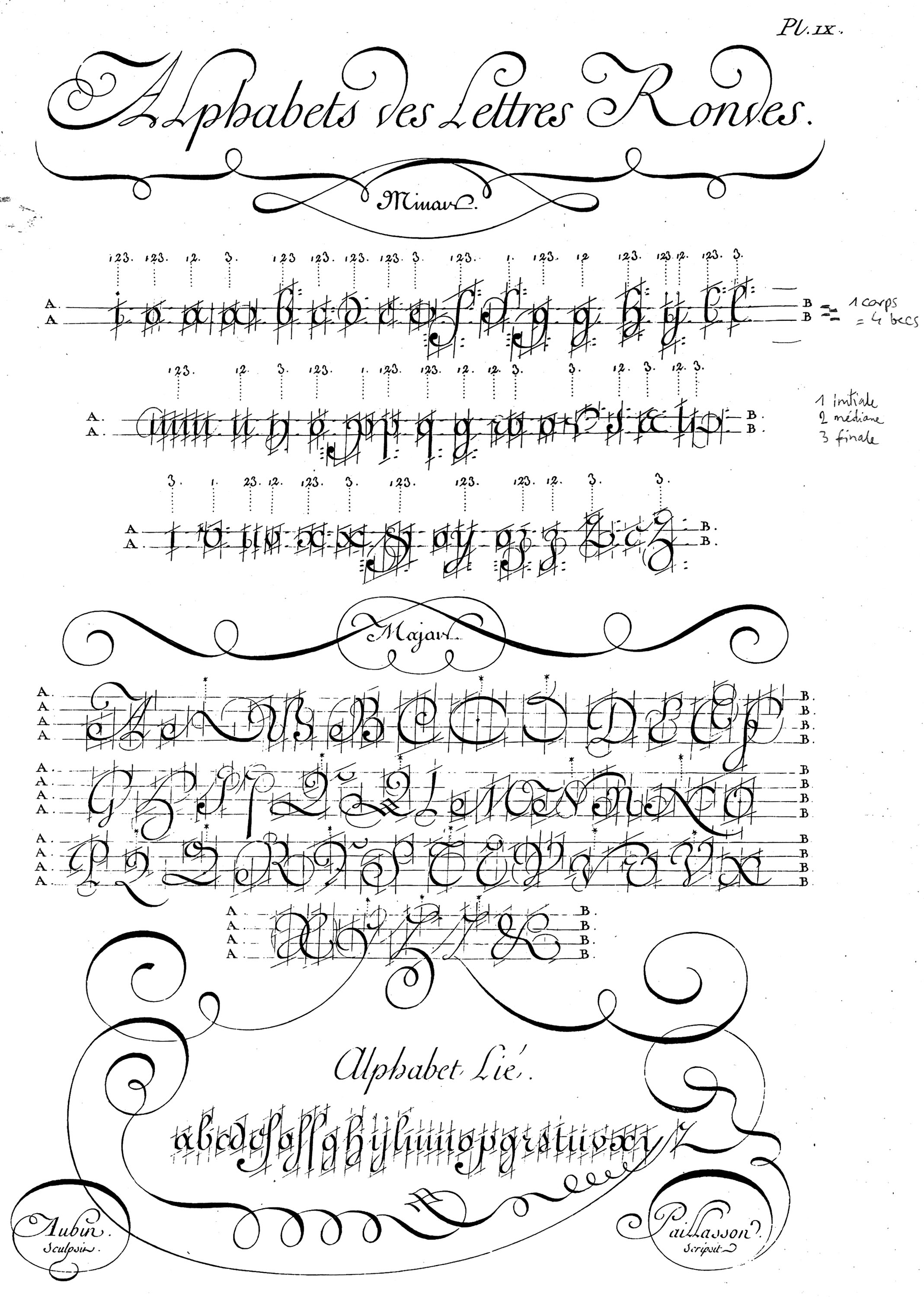 Spécimen d’écriture ronde, planche de l’Encyclopédie de Diderot et d'Alembert